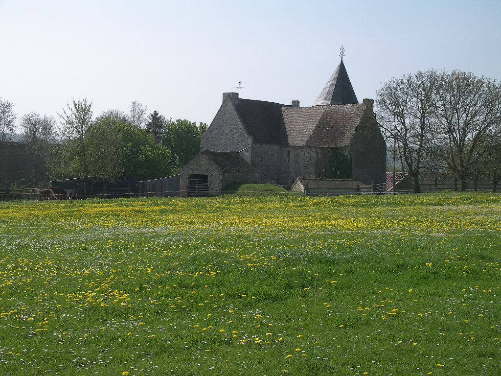 Manoir d'Ouilly-le-Tesson (Calvados)